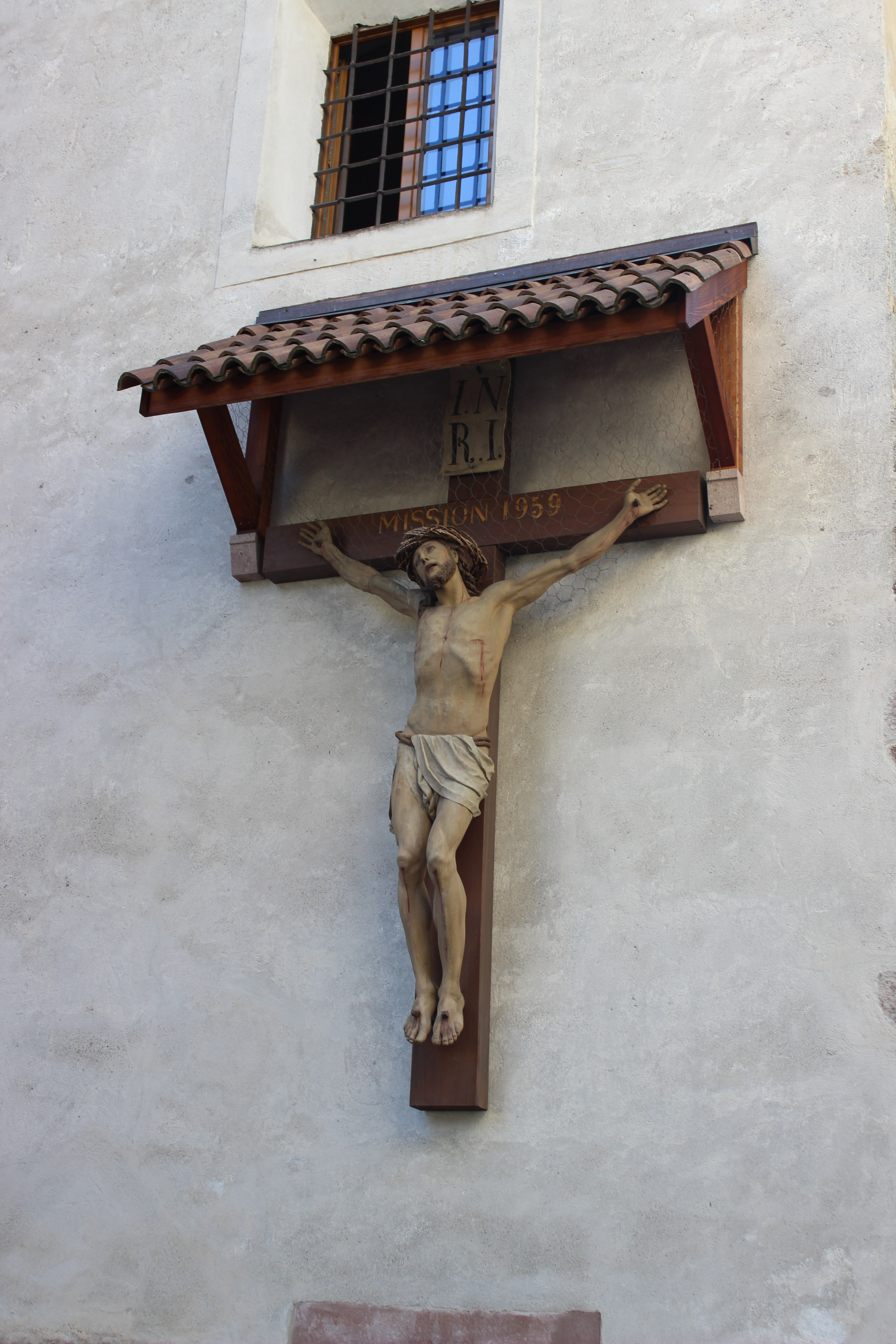 Von Johann Baptist Pendl gefertigtes Passionskreuz an der Pfarrkirche St. Nikolaus in Meran